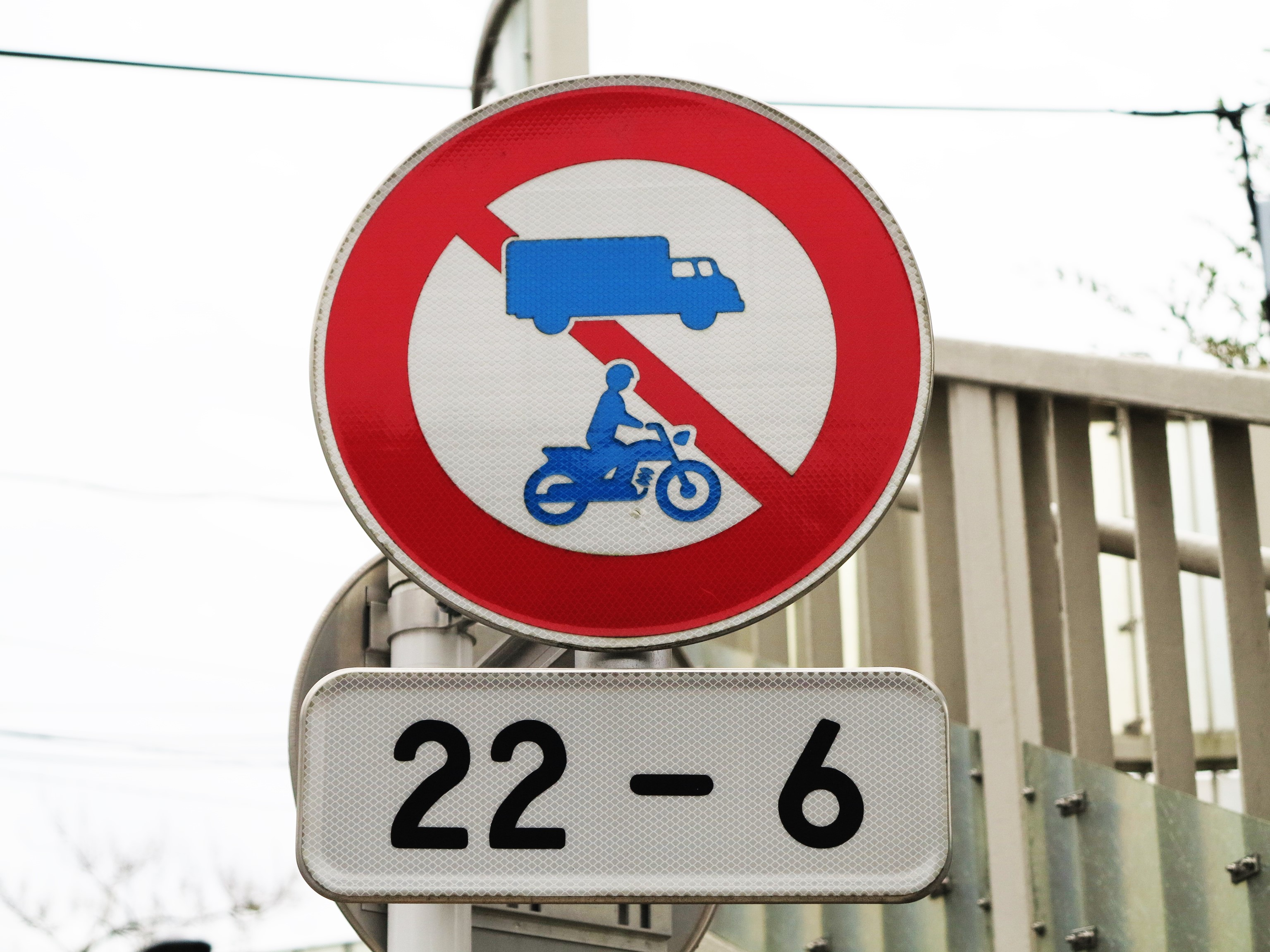 信濃町駅付近にある「車両通行止め(組合せ)大型貨物車と二輪の自動車」の標識